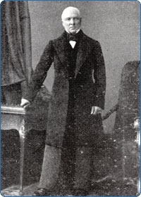 Граф Михаил Иринеевич Хрептович (18.06.1809 — 03.02.1891), действительный тайный советник, в 1853—1856 гг. чрезвычайный посланник и полномочный министр в Бельгии, в 1856—1858 гг. занимал пост посла в Великобритании.